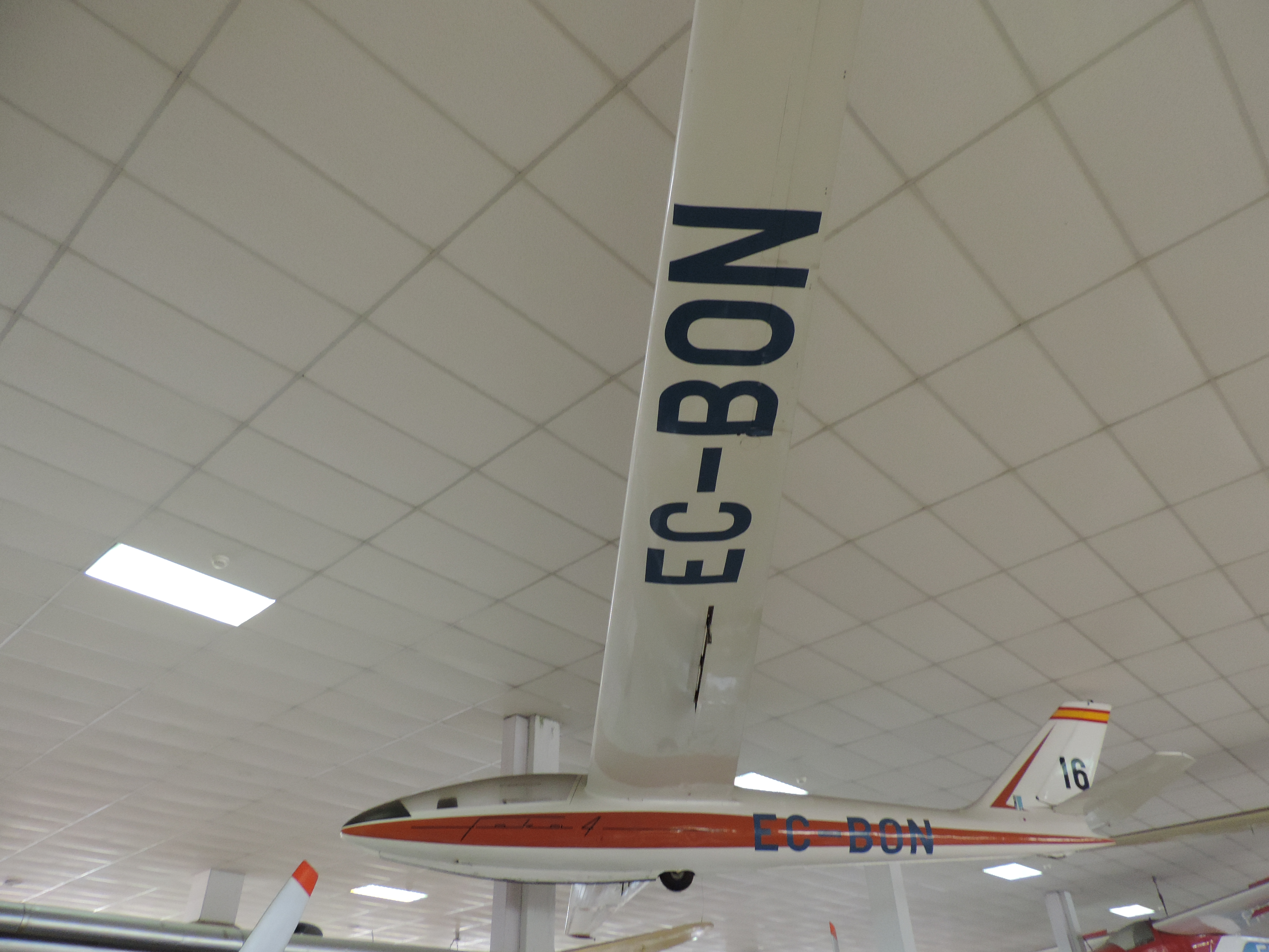 PZL Bielsko SZD-24 im Museo del Aire